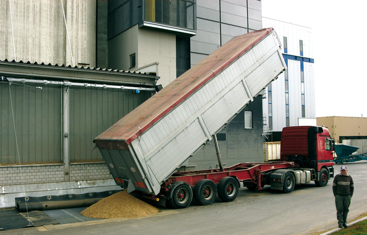 Camió descarregant cereal a la sitja més alta del món, a prop d'Ulm (Baden - Wurtemberg - Alemanya).